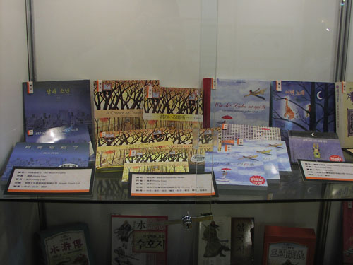 幾米作品的譯本